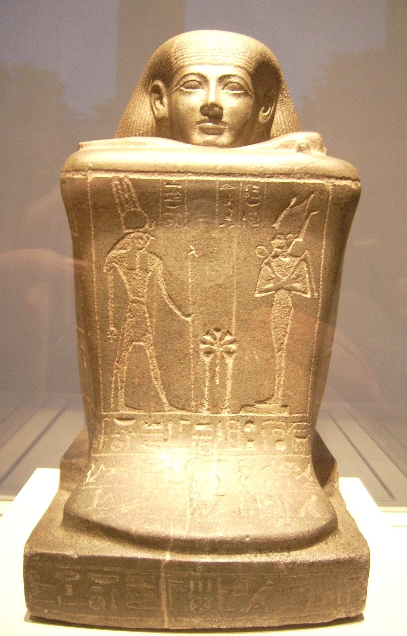 Würfelfigur des Hor; 3. Zwischenzeit, 23. Dynastie, um 775 v. Chr.; Grauwacket; Inv.-Nr. 17272 - Ägyptisches Museum Berlin/Altes Museum